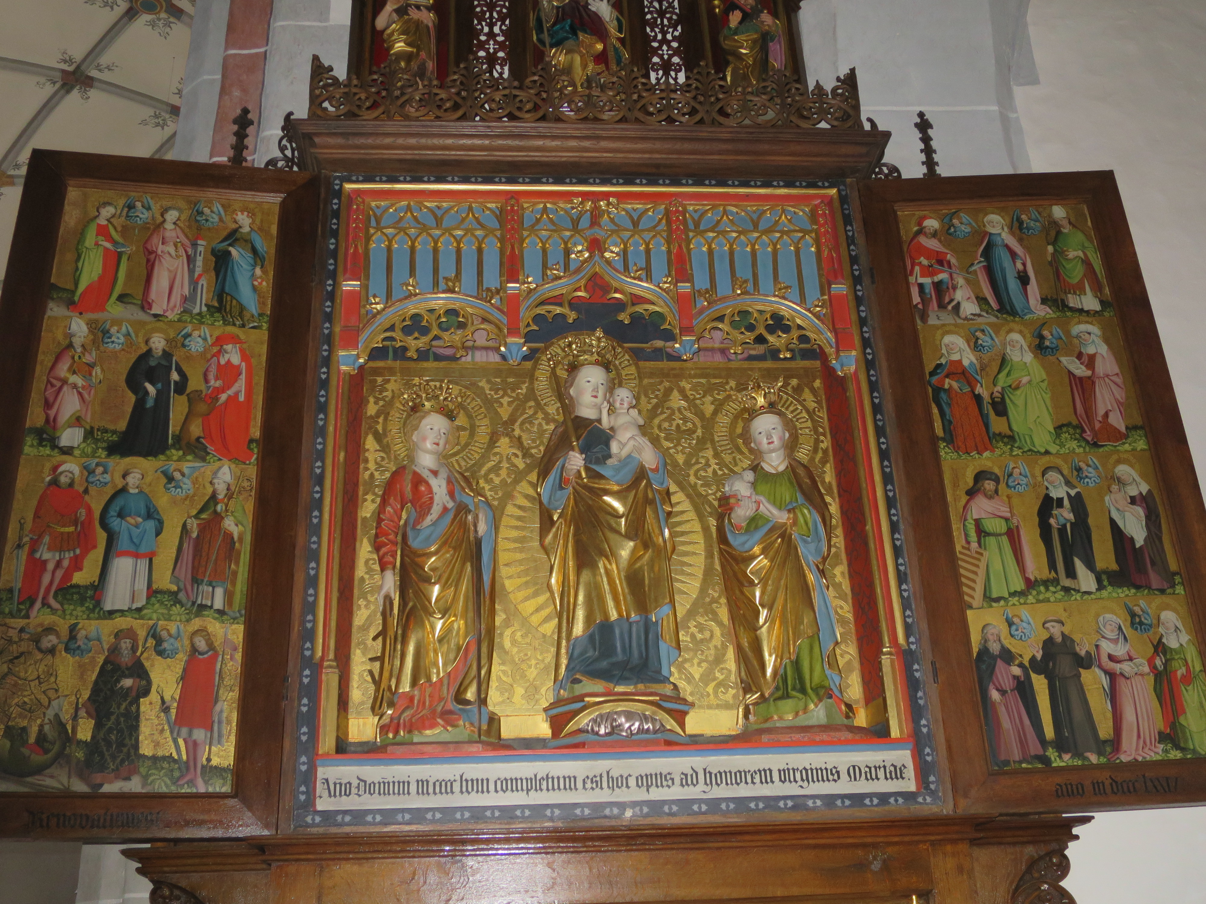 Marienaltar,Ulmer Schule,gotisch